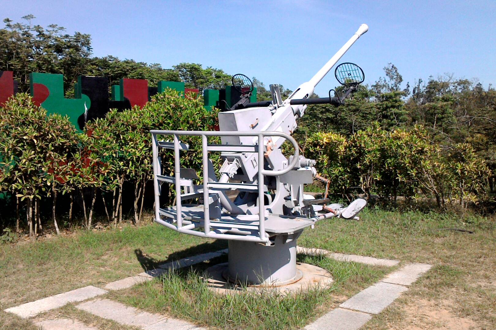 美製20公厘機砲,福建省金門縣金城鎮古城里